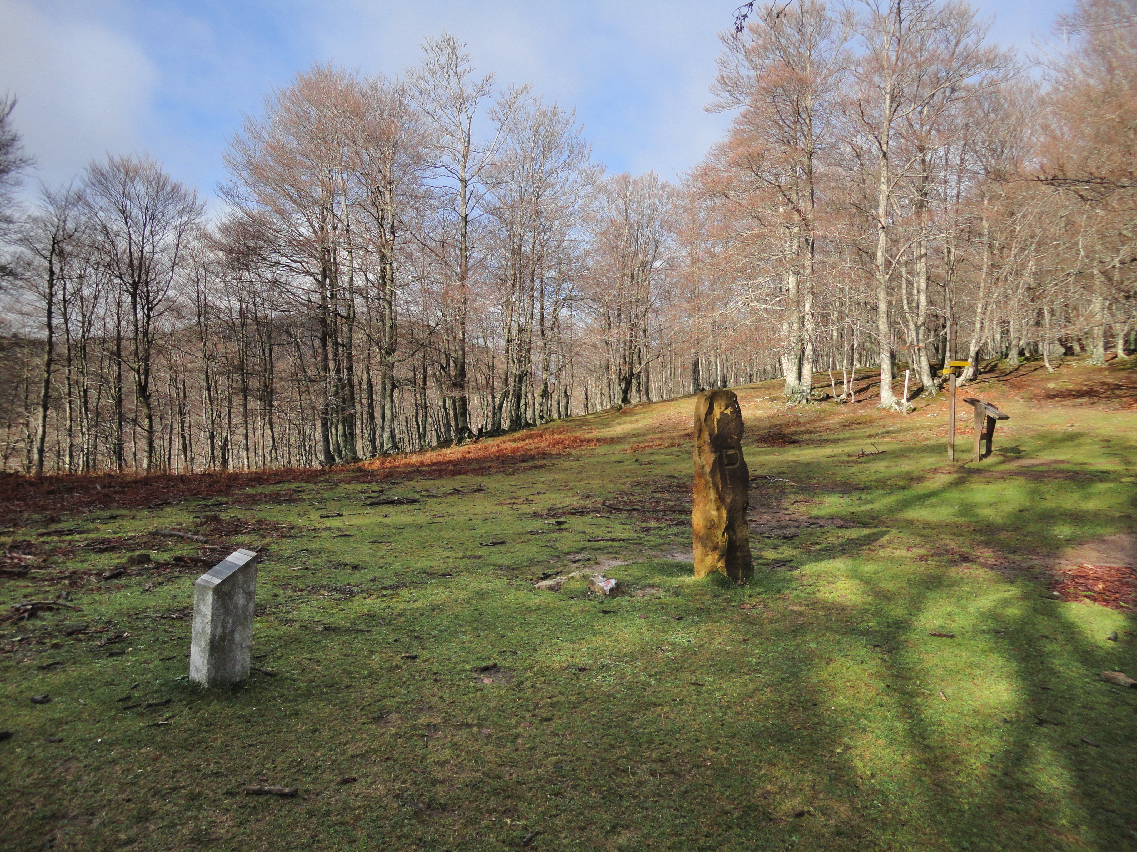 Pagarreta II zutarria